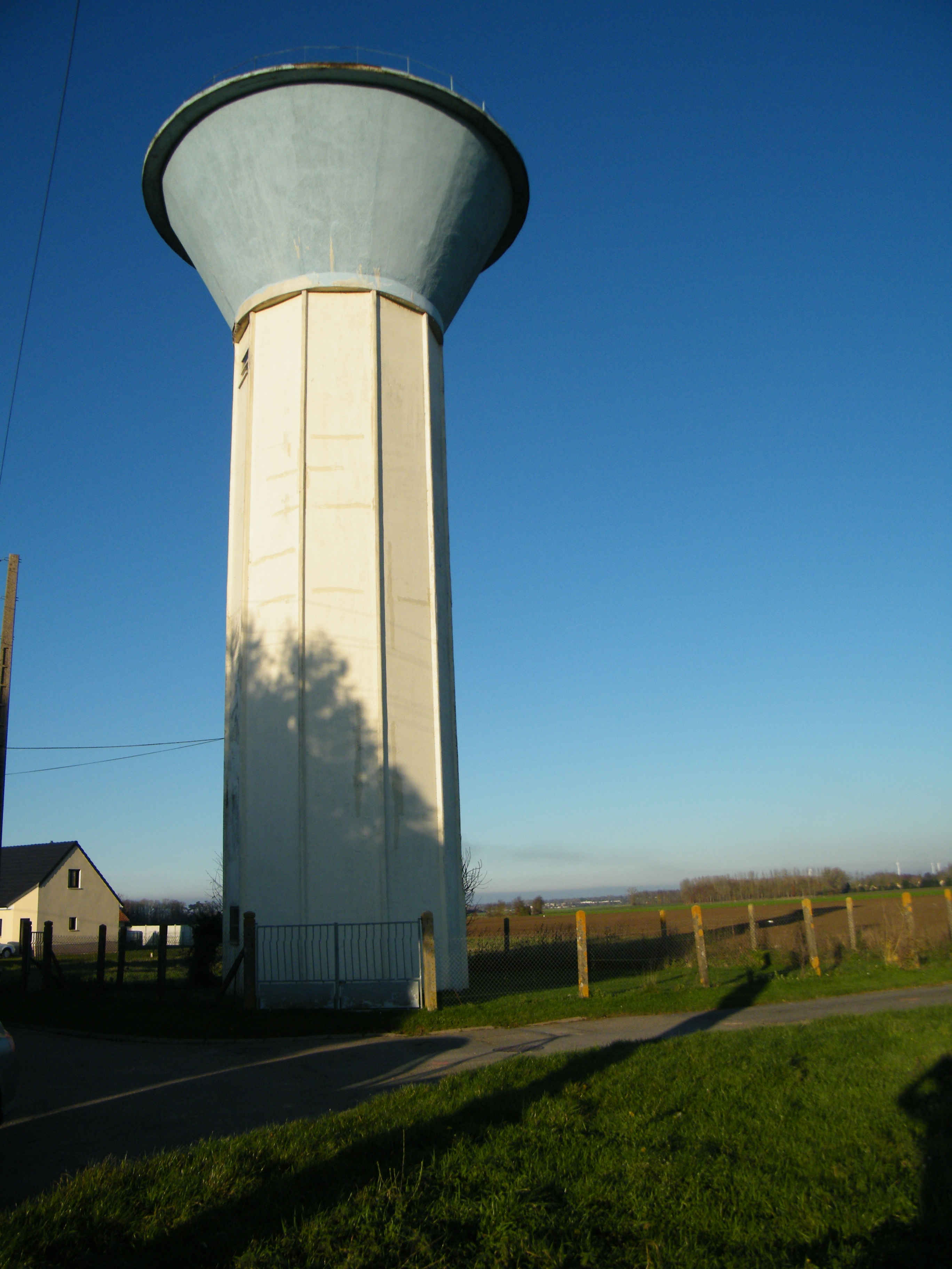 Ramburelles, Somme, France, Le Bocquet, château d'eau.